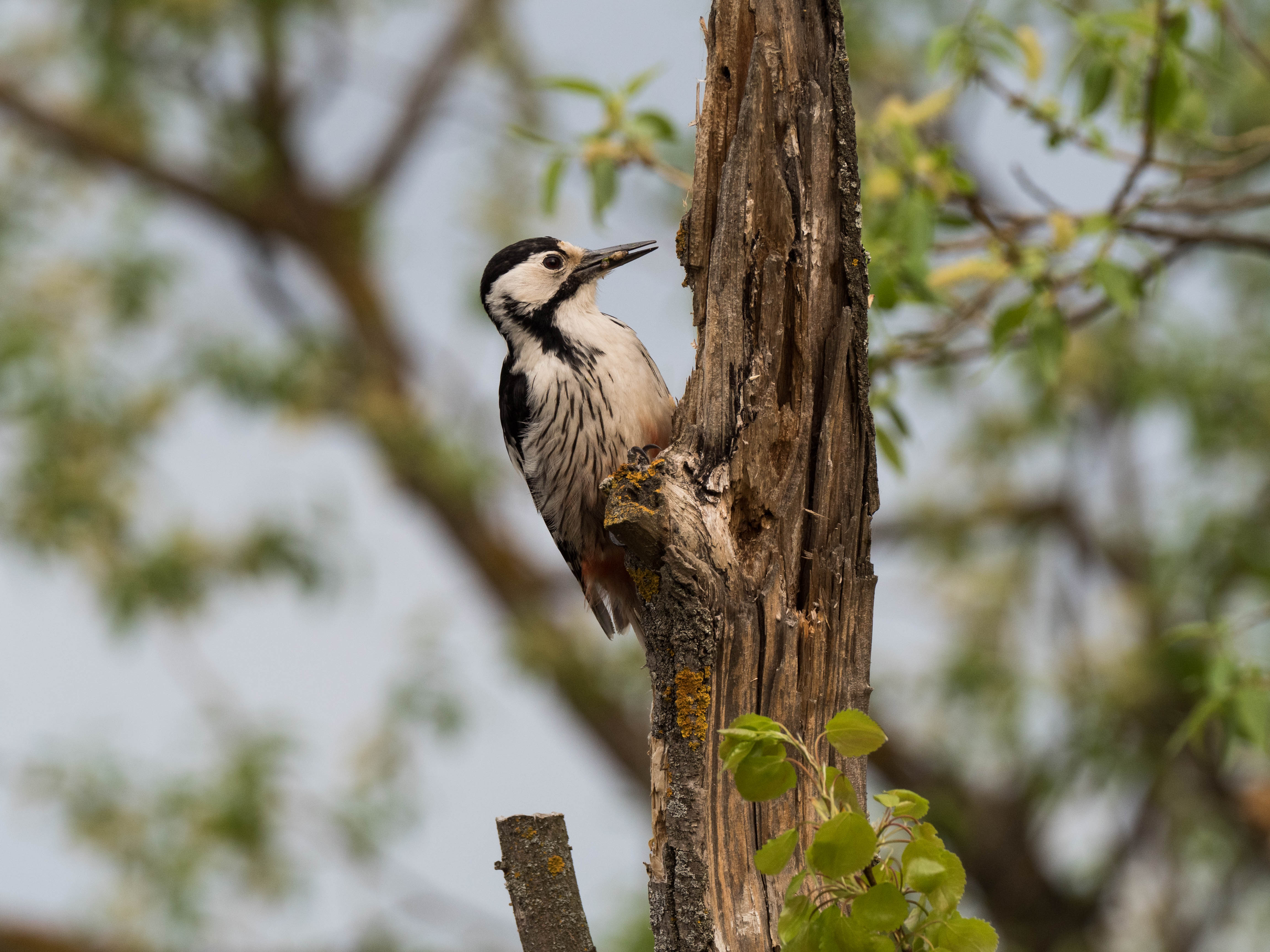 Москворецкий пойменный (Виноградовский): Пойма рр. Нерская и Москва, к югу от ст. Виноградово, Виноградово, Воскресенский район, Московская область This image is related to the protected area of Russia number 5010026